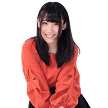 五味茉莉伽（声優）